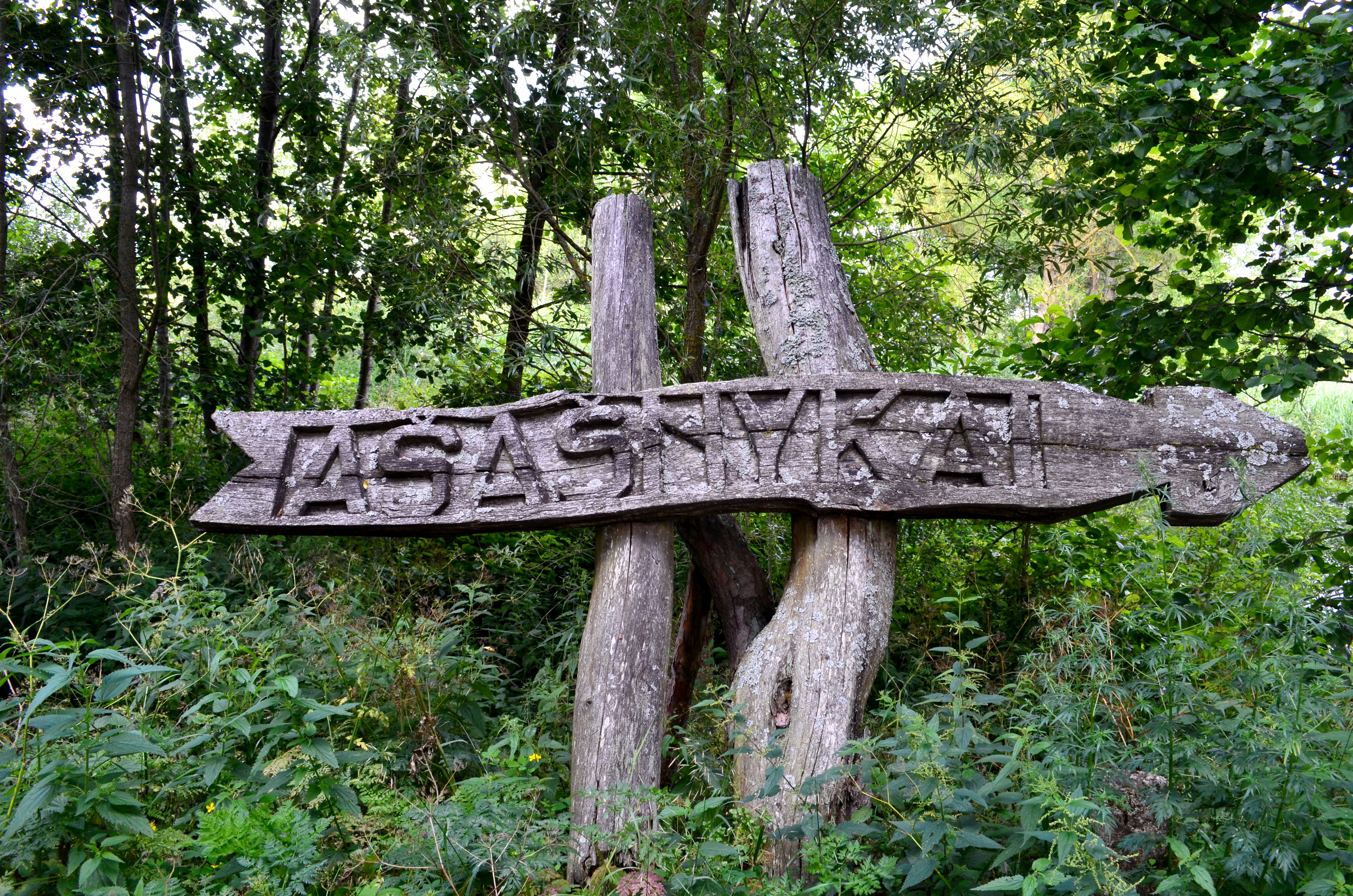 Ašašnykų k. ženklas, Varėnos r.